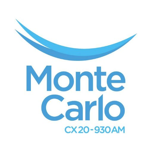 Logo Radio Monte Carlo